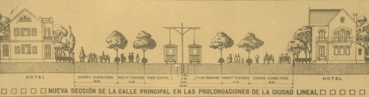 Proyecto urbanístico de la Ciudad Lineal en 1895, planificación y dibujos publicados en el periódico "La Dictadura" de la Compañía Madrileña de Urbanización.